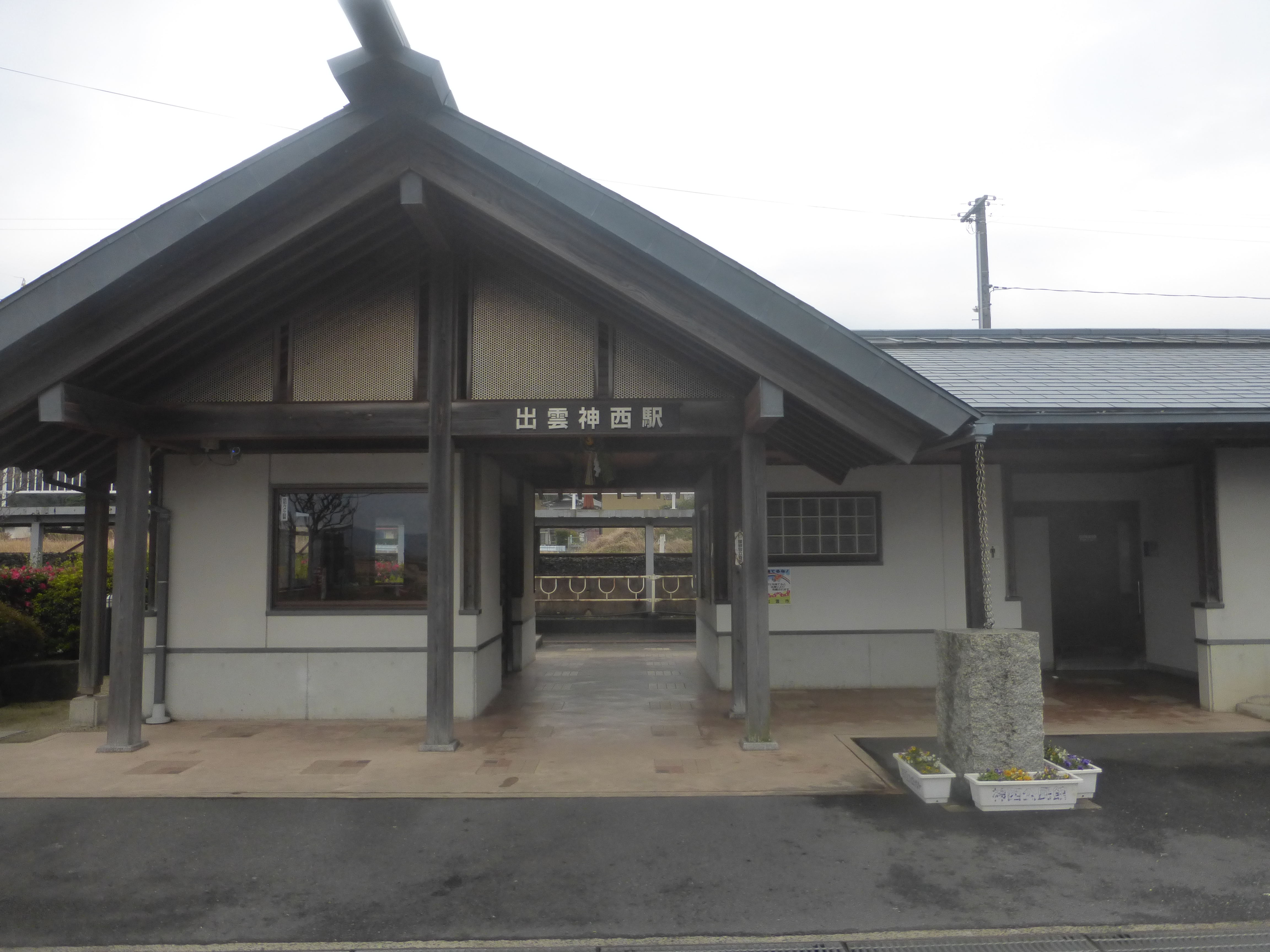 Izumo-Jinzai Station (出雲神西駅)